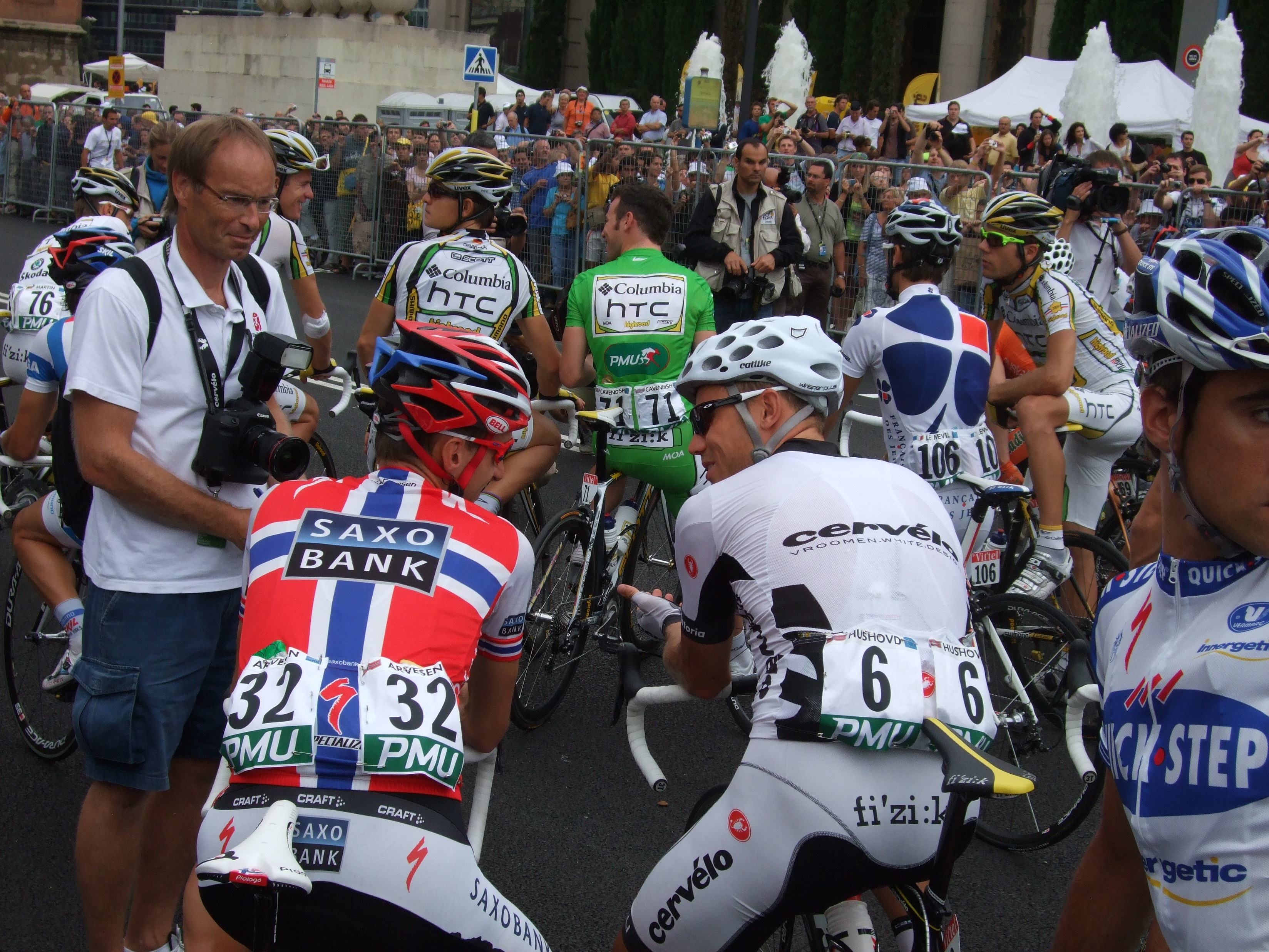 Like før start på etappe 7 i Barcelona under Tour de France 2009. Kurt Asle Arvesen i norsk meistertrøye, Thor Hushovd med nr. 6. Hushovd vann etappen dagen før.